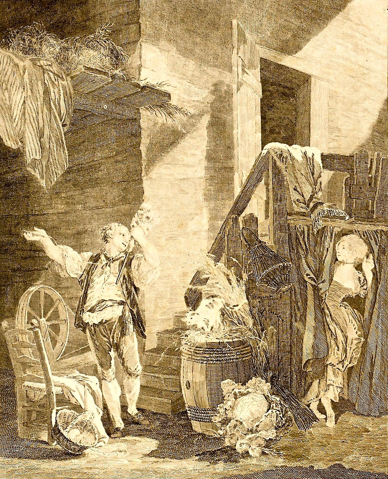 Jean-Baptiste Blaise Simonet (1742–1813) nach Pierre-Antoine Baudouin (1723–1769): Szene aus der Comédie (Opéra-comique) "Rose et Colas" von Pierre-Alexandre Monsigny (1729–1818, Musik) und Michel-Jean Sedaine (1719–1797, Libretto), 1764. Radierung und Gravur. National Gallery of Art, Washington, D.C.